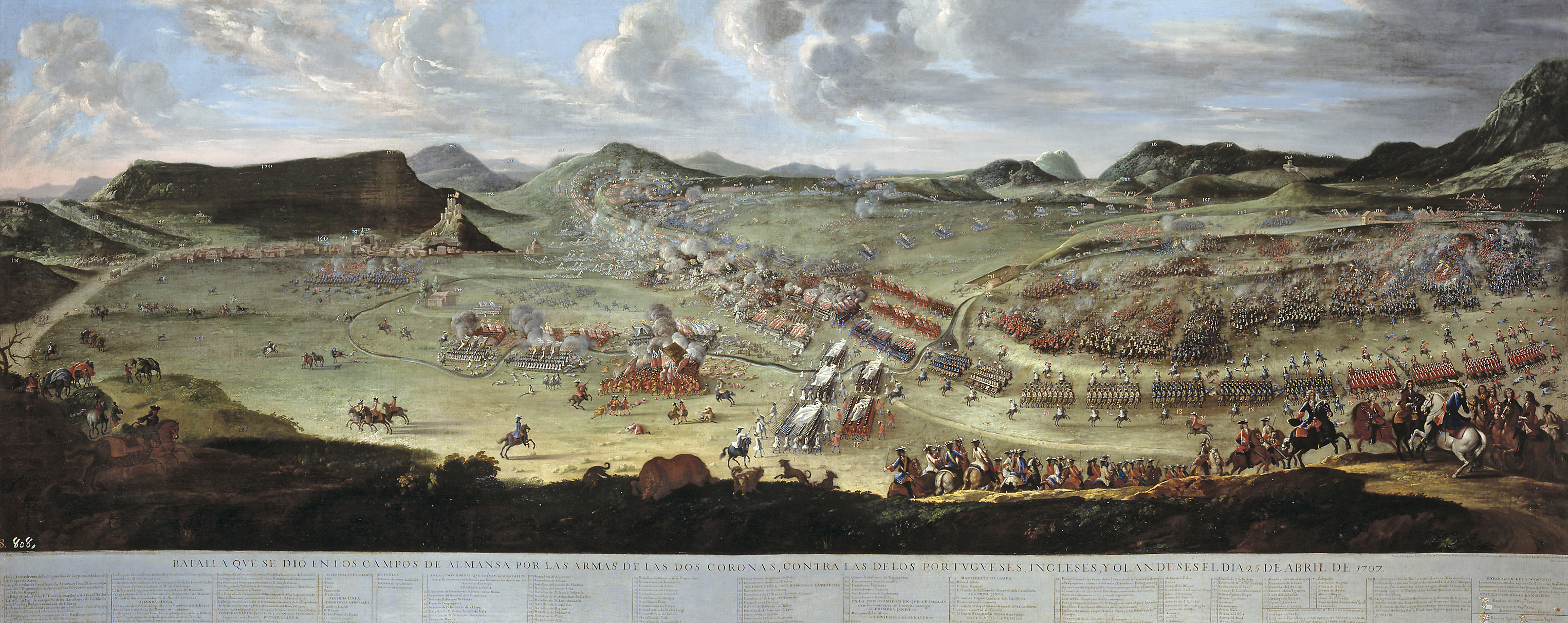 La Batalla de Almansa, óleo sobre lienzo, 161 x 390 cm, Madrid, Museo del Prado